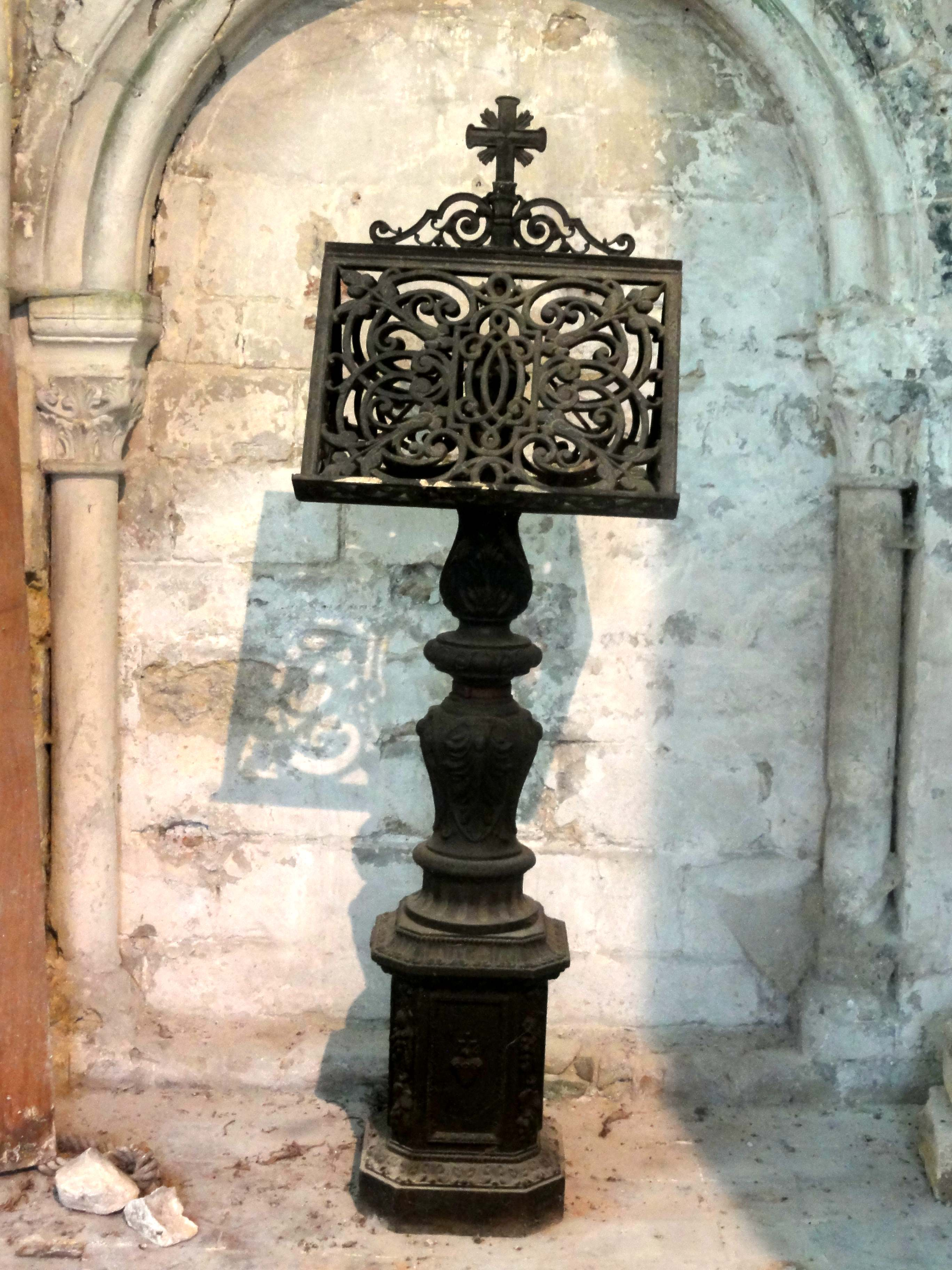 Lutrin.